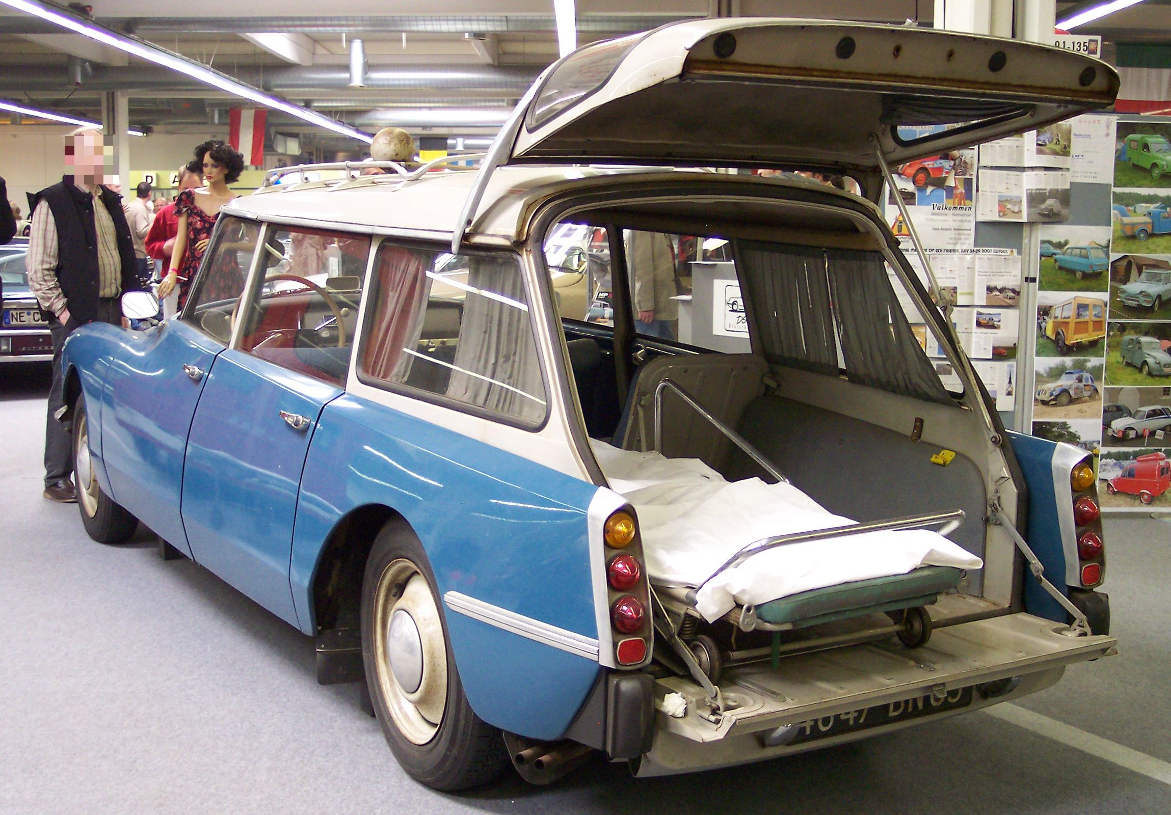 Citroen DS Break Ambulance